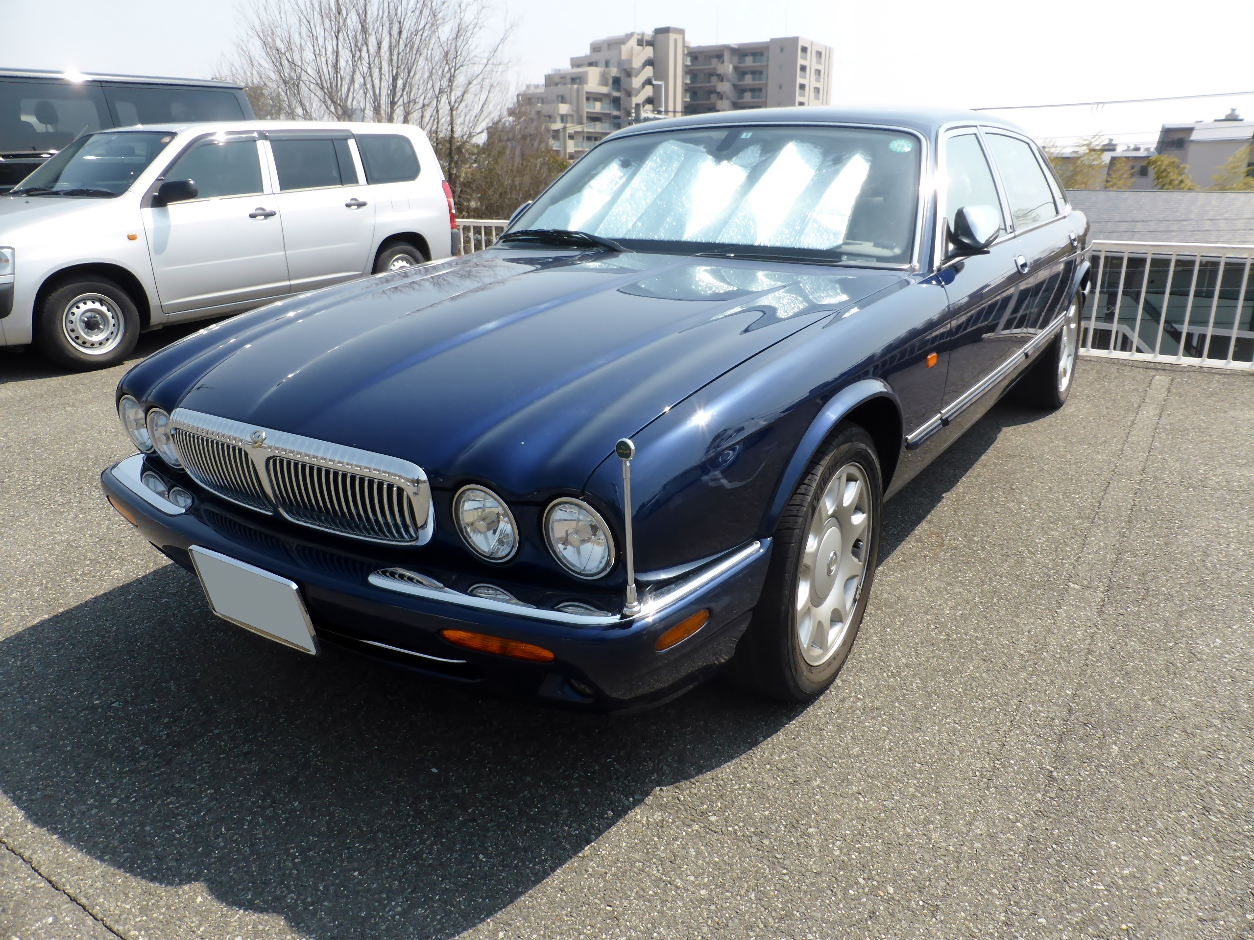 デイムラー・スーパーV8をフロントから撮影。